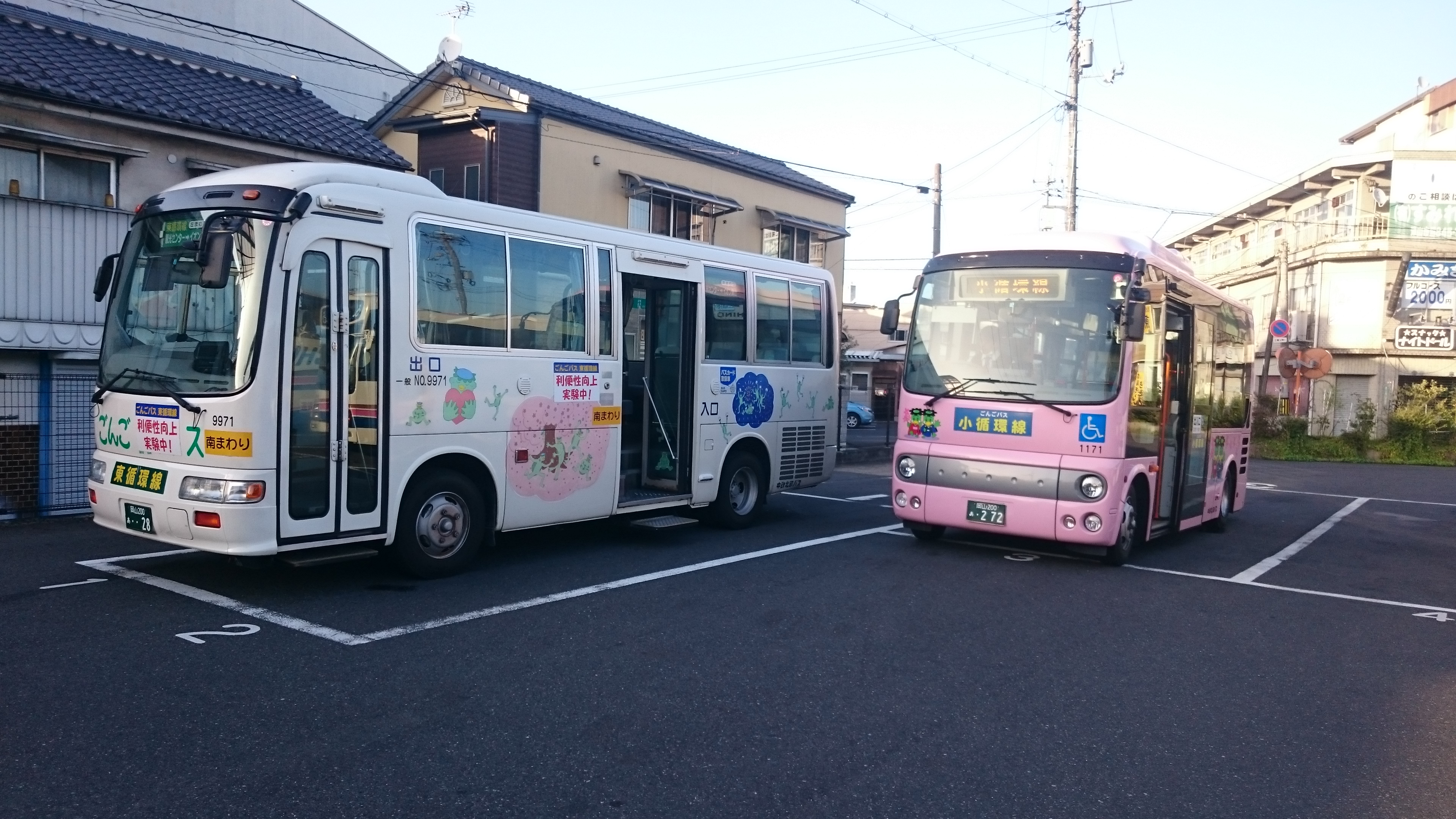 ごんごバスの「東循環線用」リエッセと「小循環線用」ポンチョです。